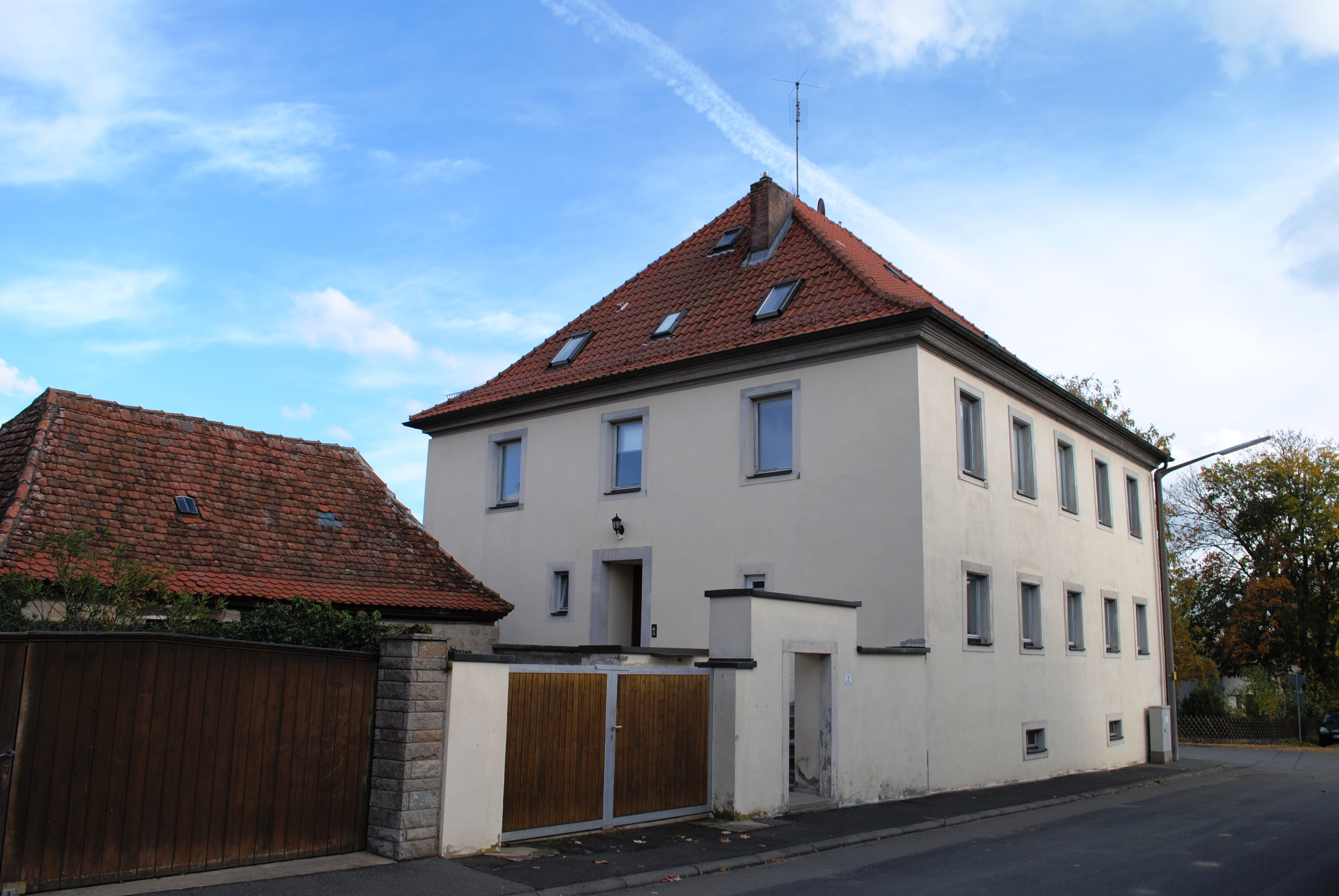 Wohnhaus, Dettelbacher Straße 2, Schwarzach-Schwarzenau, zweigeschossiger Walmdachbau in Ecklage, 1. Hälfte 19. Jahrhundert; D-6-75-165-33